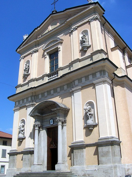 Arcene - Chiesa Parrocchiale di S. Michele